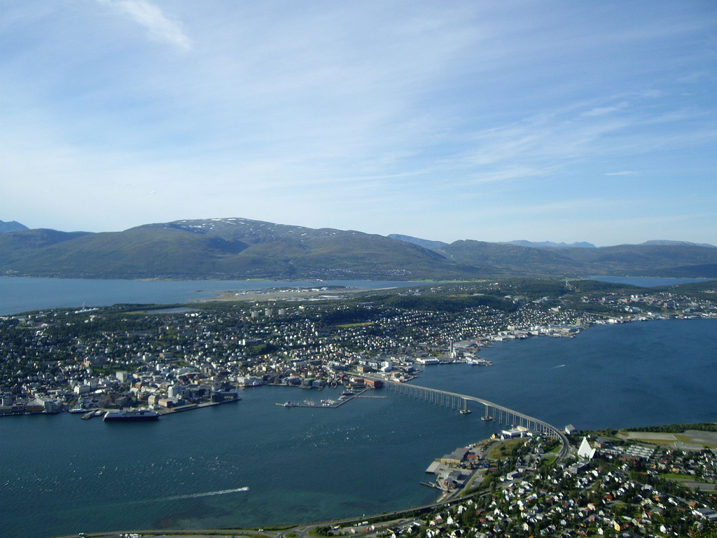 Tromsø, Norway